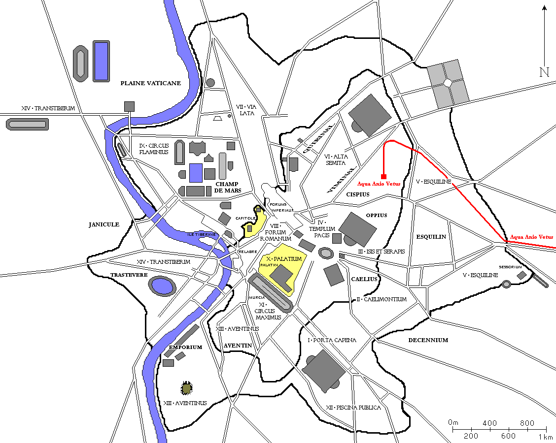 Plan de Rome avec l'Aqua Anio Vetus en rouge